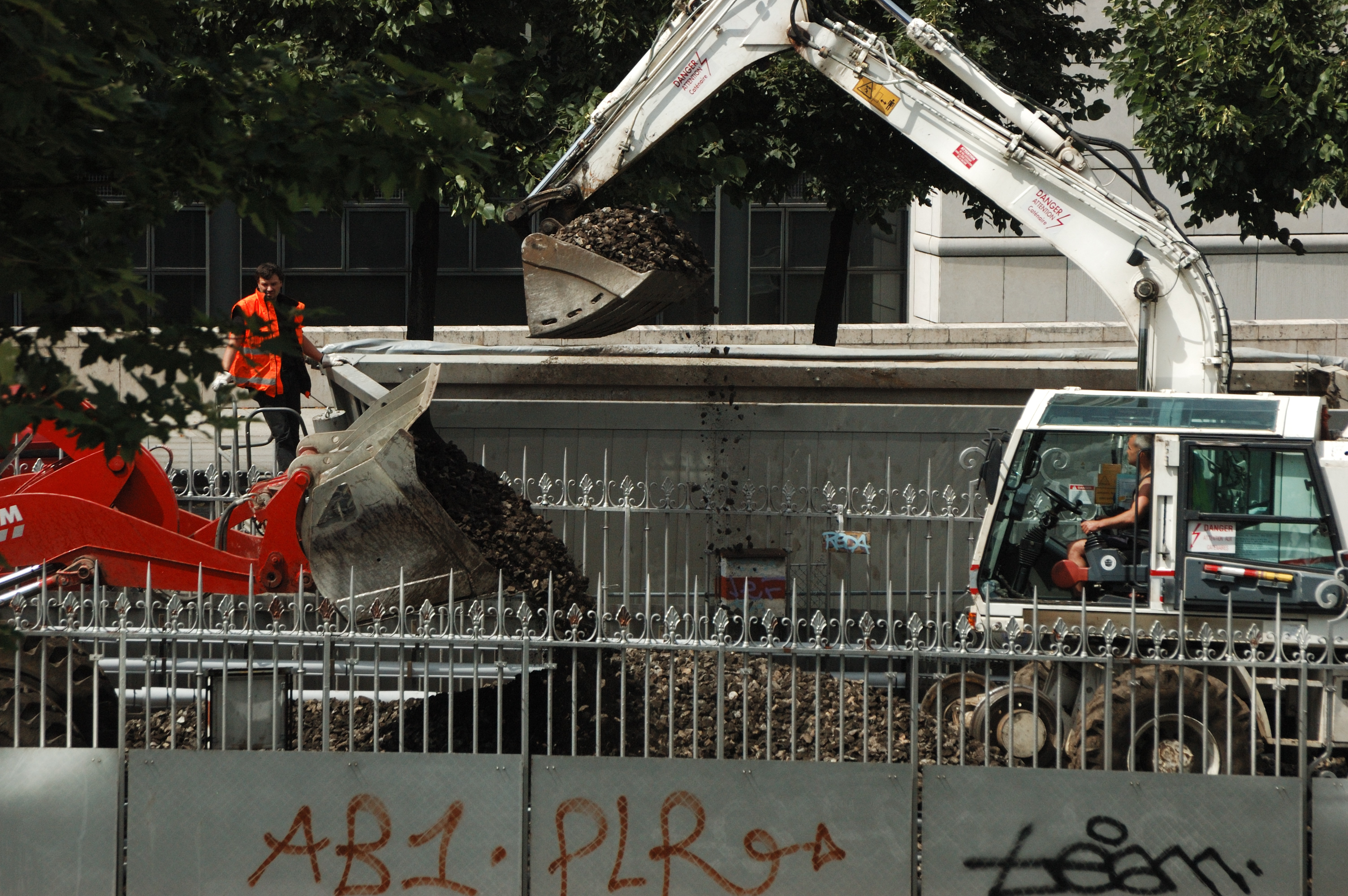 Travaux de rénovation de la ligne 6 du métro parisien